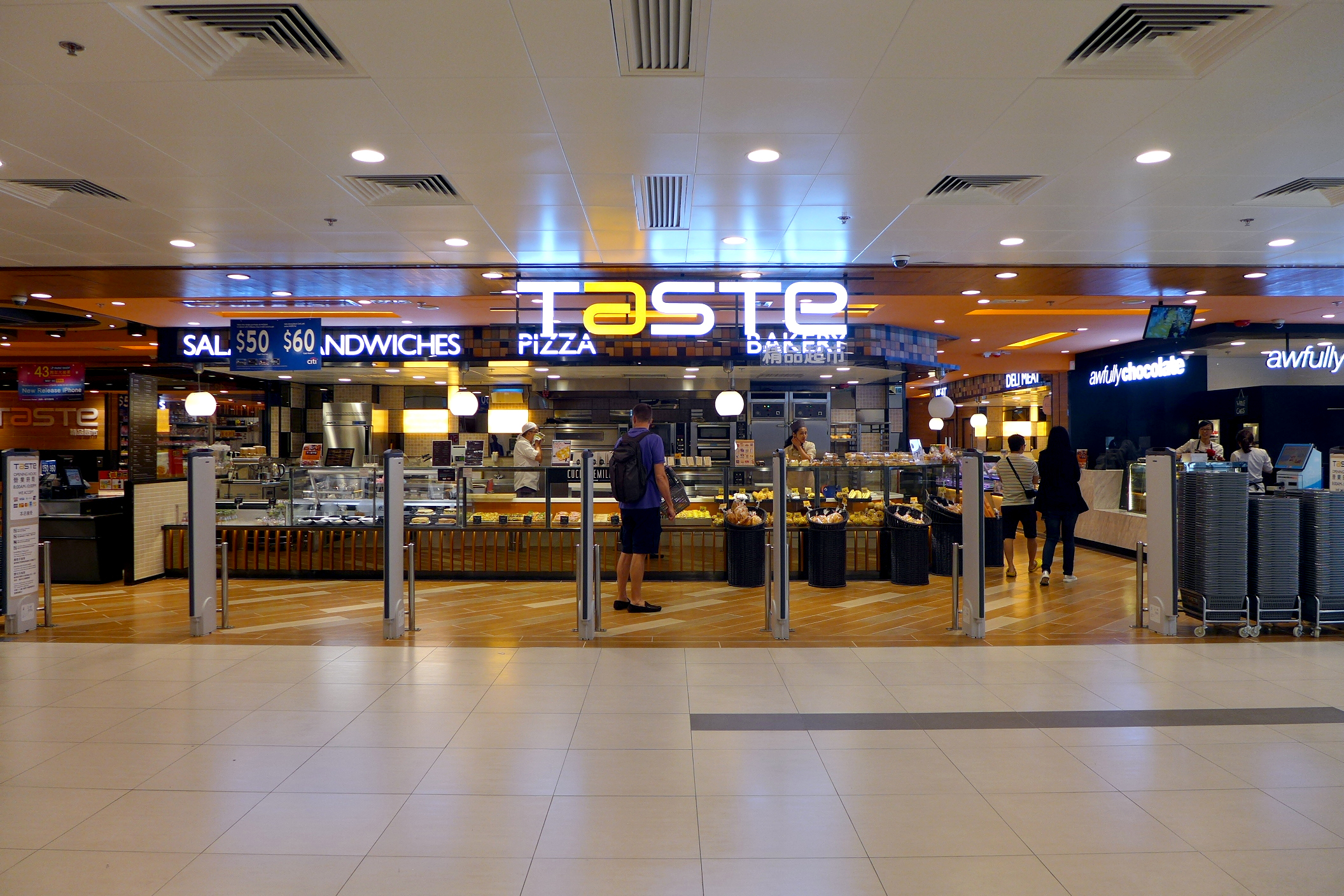 Taste Supermarket in Shun Tak Centre